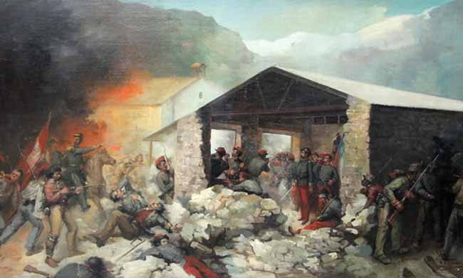 Representación del combate de Sangra, 26 de junio de 1881.